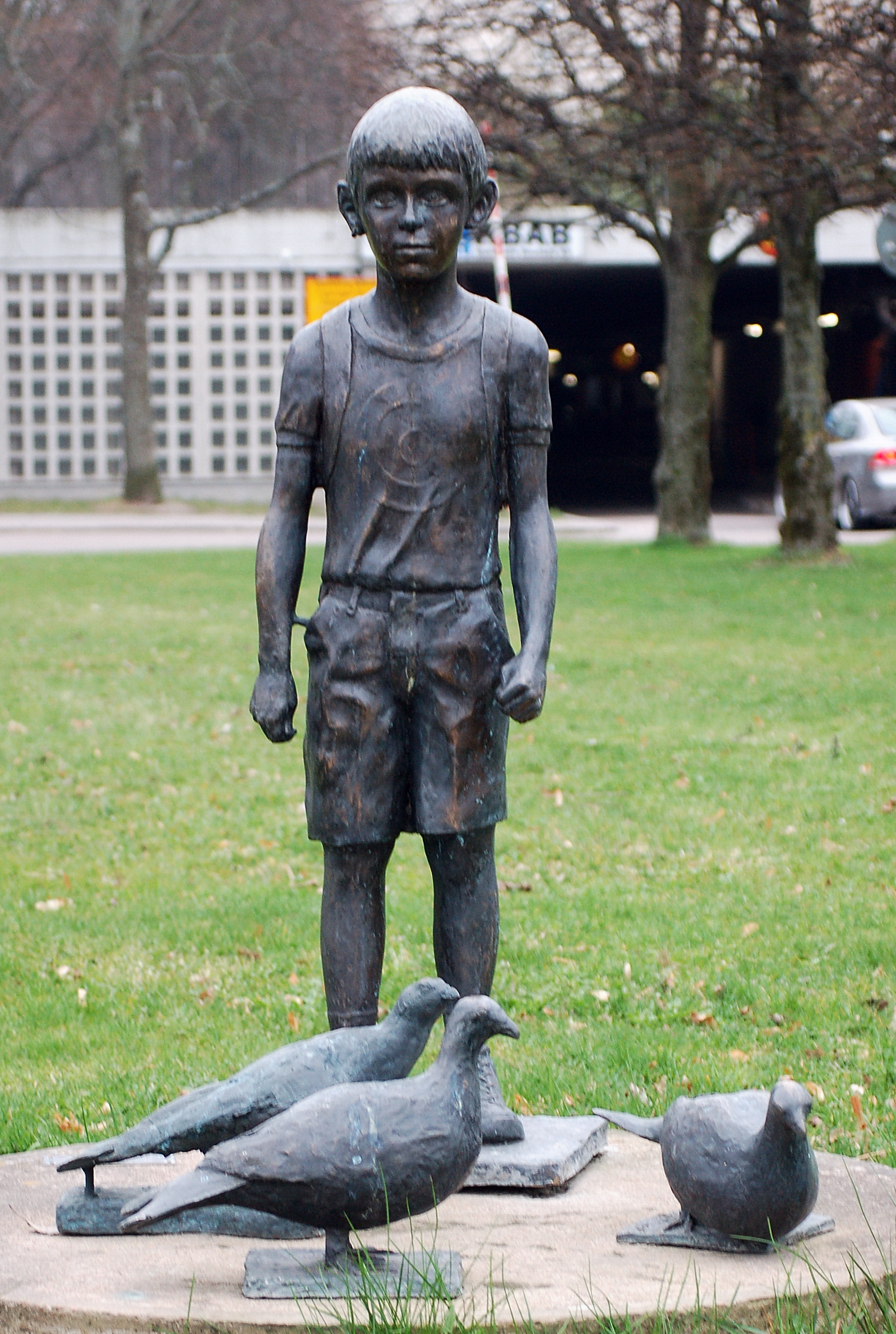 Ett fall och en lösning av Pecka Söderberg 2001 är ett tredelat konstverk placerat i Orrholmsrondellen, Karlstad.